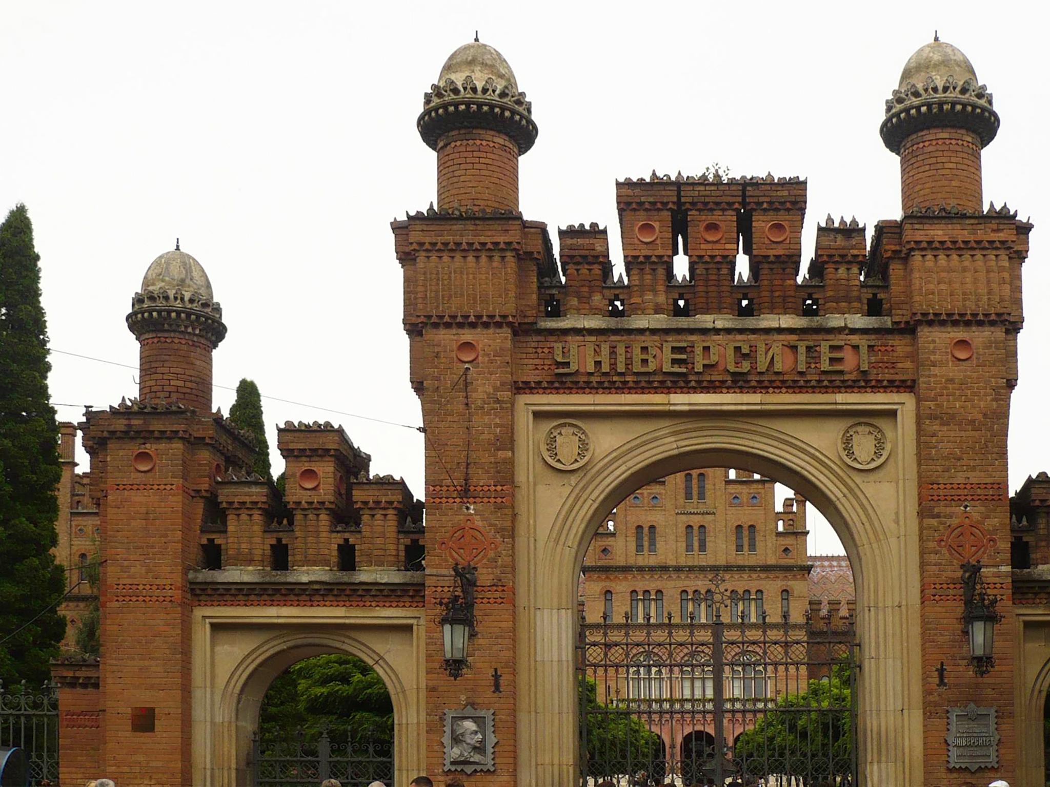 Czerniowce, brama uniwersytetu, 2009 r.